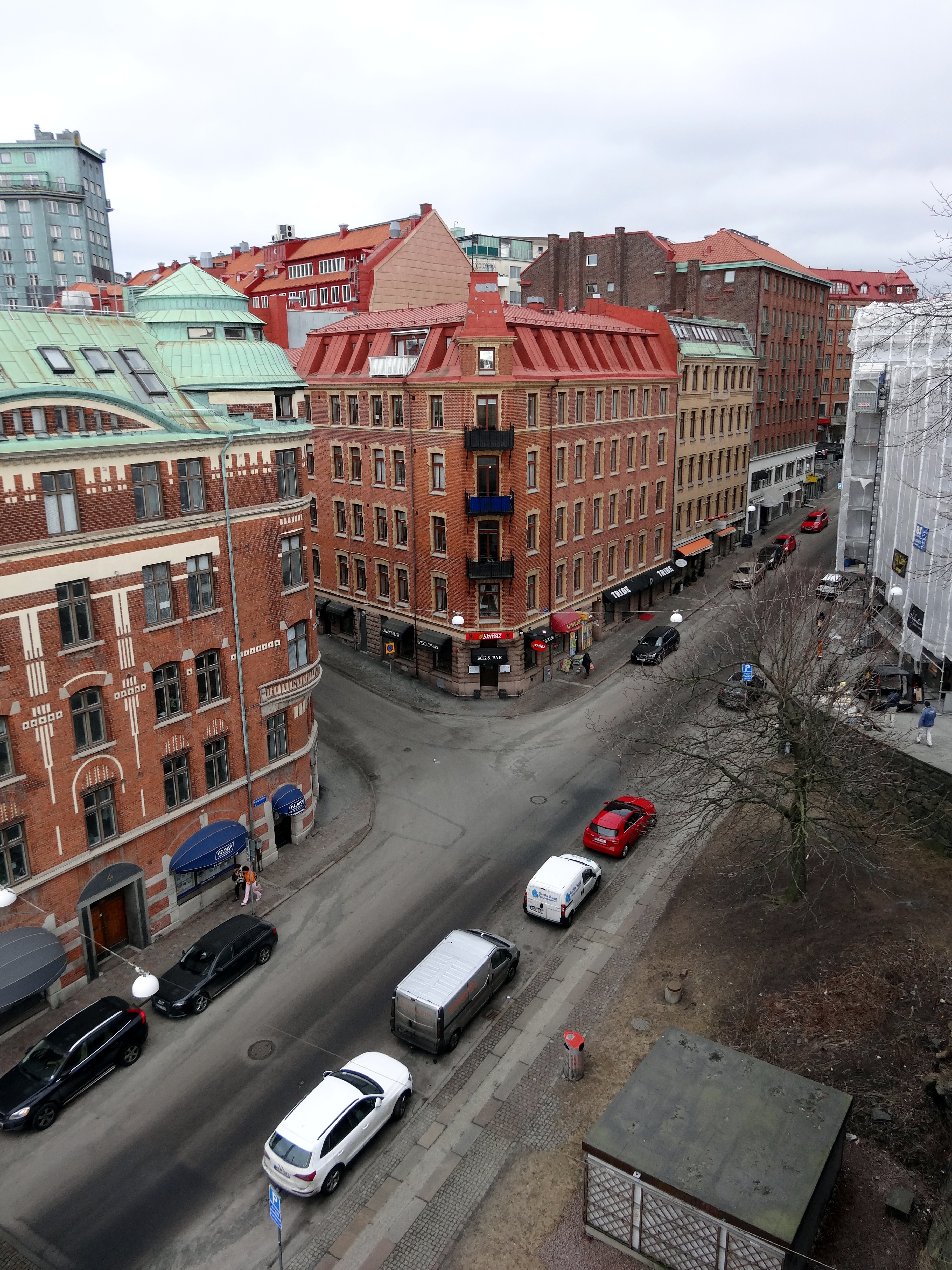 Kungsgatan i Göteborg. Gatans västra del vid korsningen med Ingenjörsgatan.